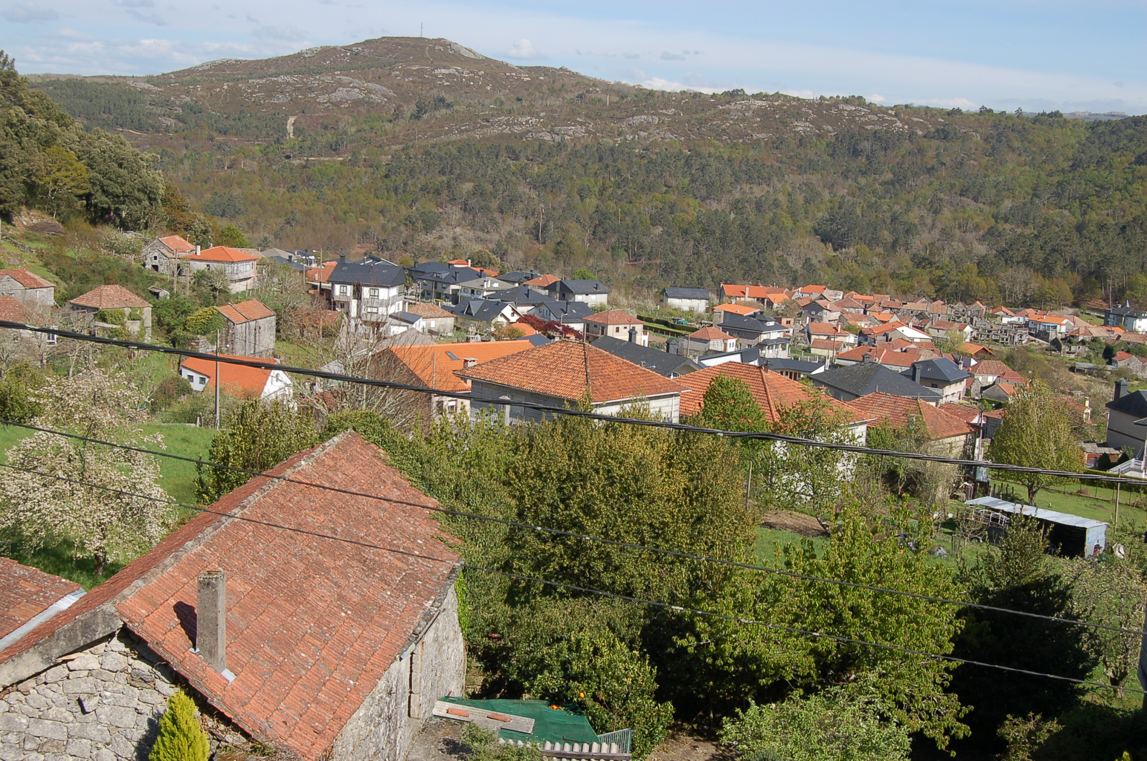 Vista da aldea de Abelenda (na parroquia de Abelenda, concello de Avión) desde a igrexa parroquial de Santa Mariña